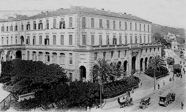 Le grand lycée d'Alger (lycée Bugeaud) vers 1900, donnant sur la place Bab el-Oued, nommée plus tard place Jean Mermoz. Il a été construit entre 1862 et 1868.